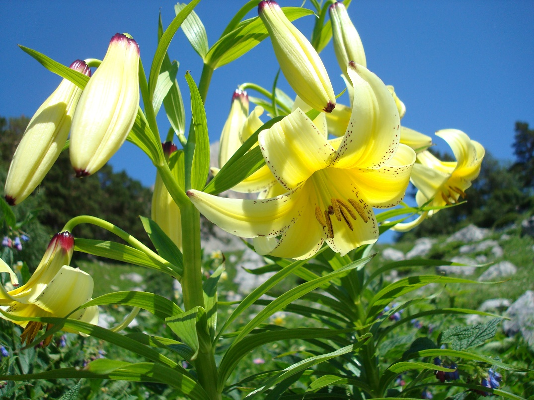 Кавказская лилия, занесённая в Красную книгу. Западный отдел Кавказского заповедника